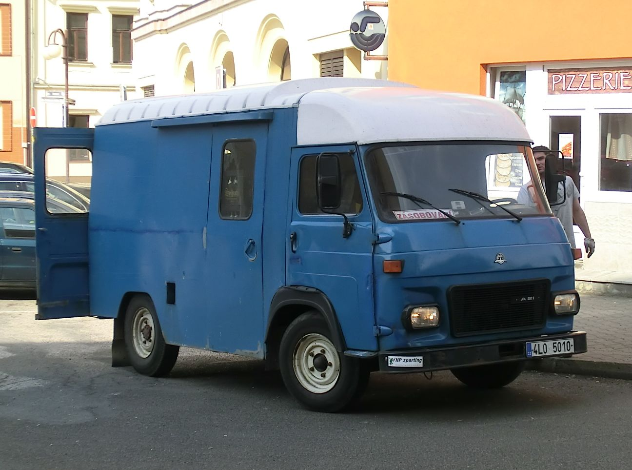 Skříňová Avia A21 ve službách zásobování potravinami.